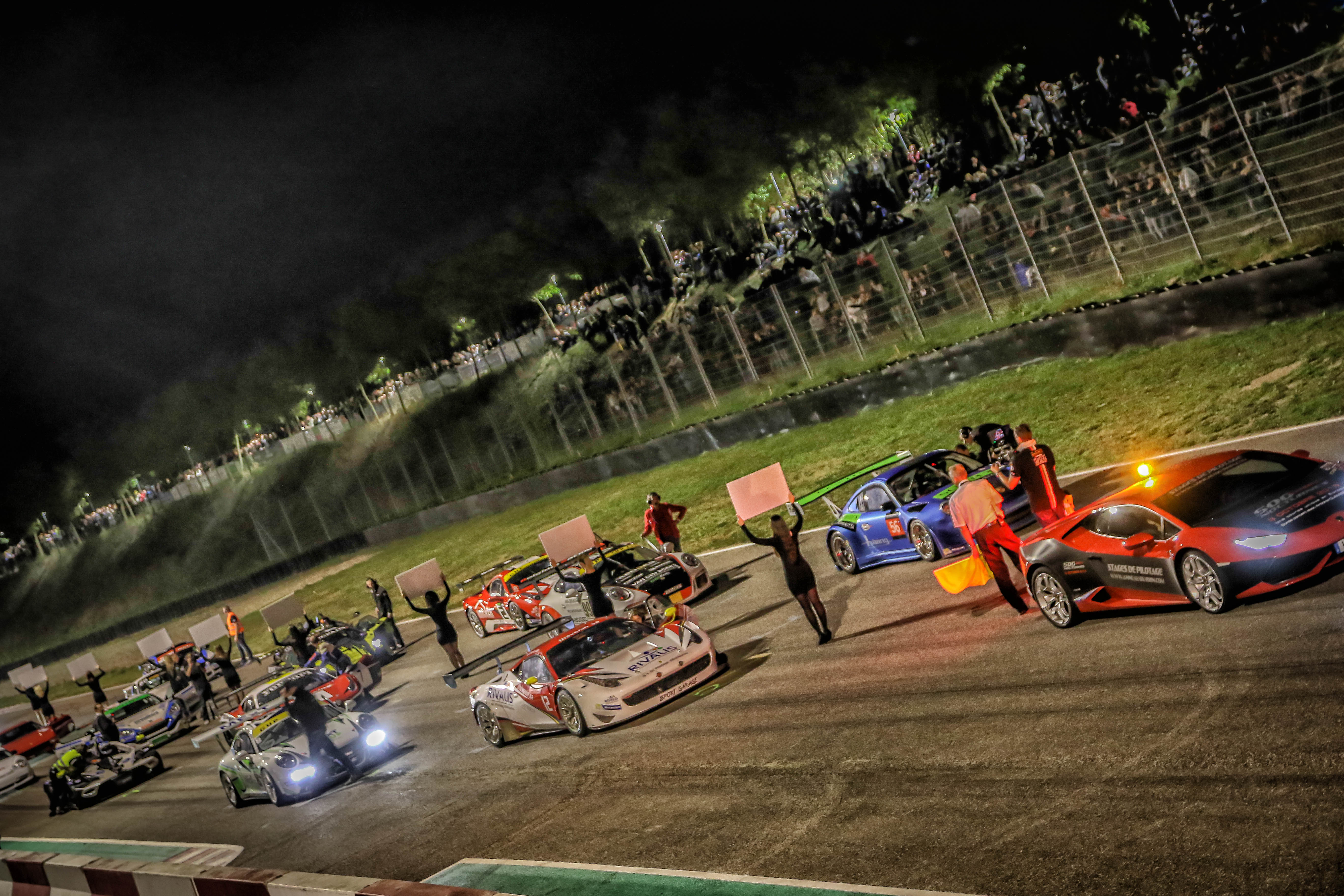 La Porsche 997 R en pole, juste devant la Ferrari 458 GT3 en deuxième place